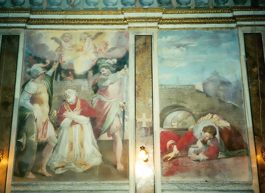 The Martyrdom of Pope Anicetus, frescoes by Antonio Circignani, called Pomarancio Chapel of Sant'Aniceto e Beata Vergine della Clemenza, Palazzo Altemps, Roma